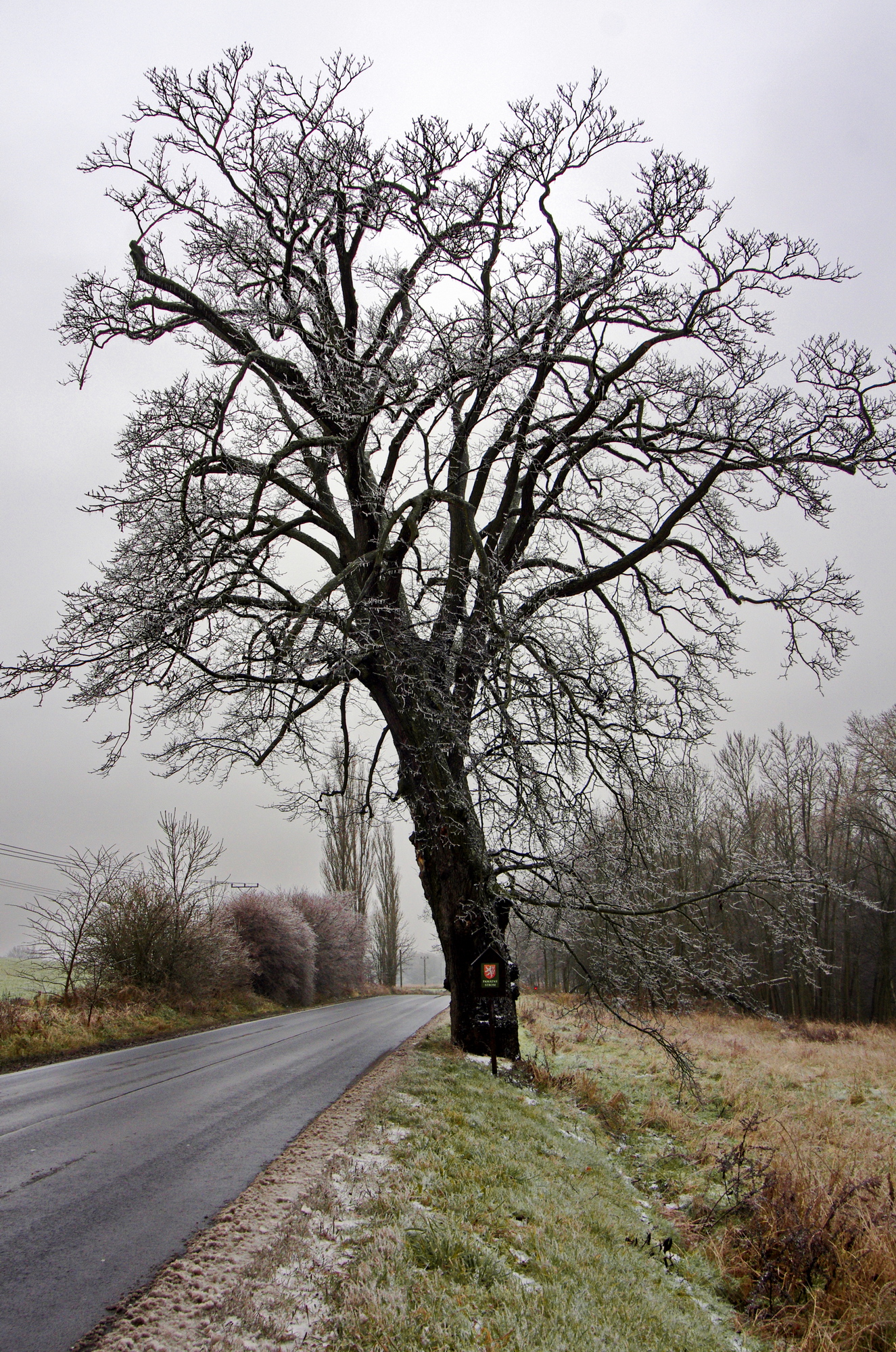 památný strom Jilm pod Starou Ovčárnou, Sokolov